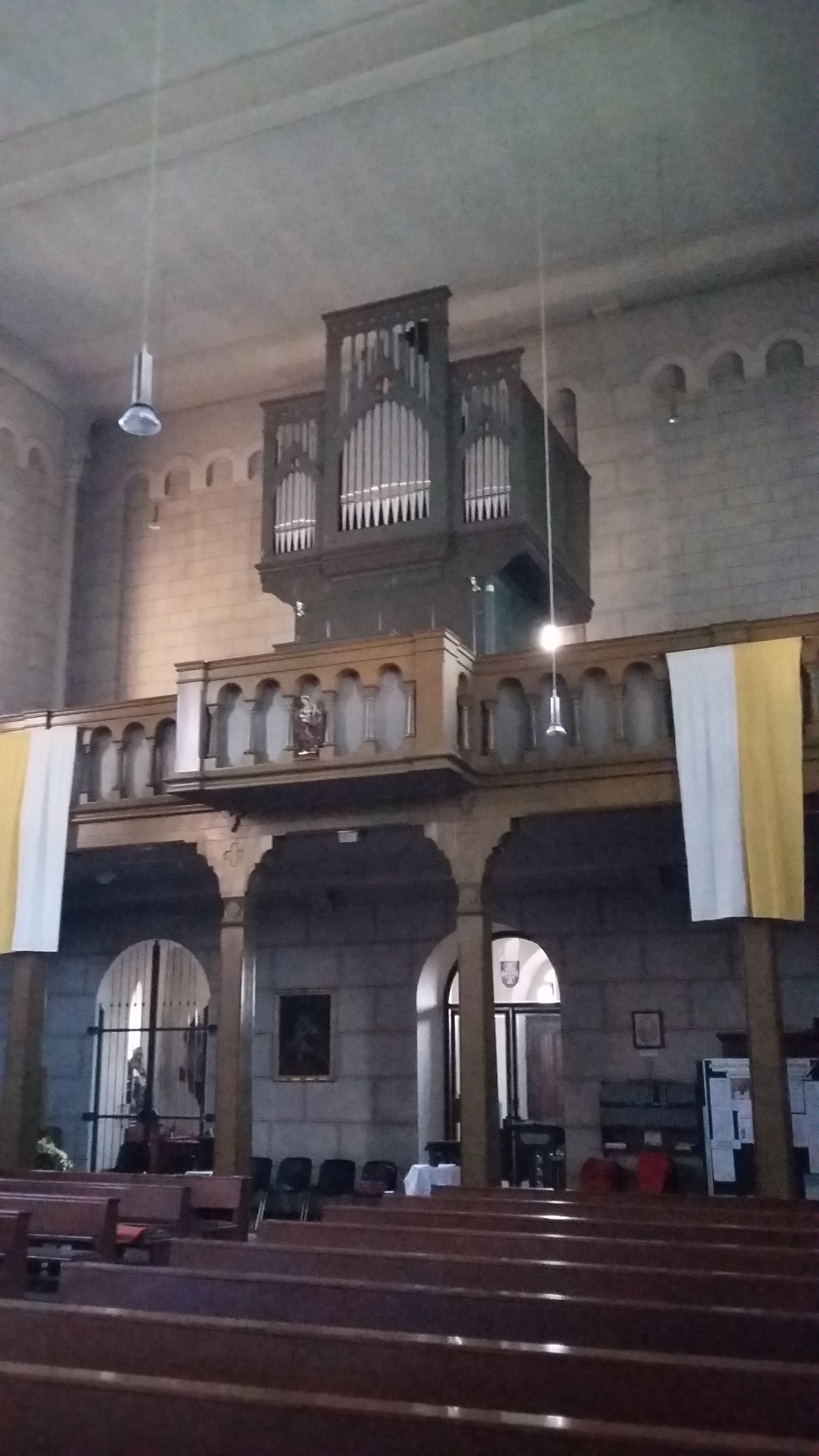 Horn-Orgel Georgskirche Pfaffenwiesbach mit rekonstruiertem Prospekt 2018 3